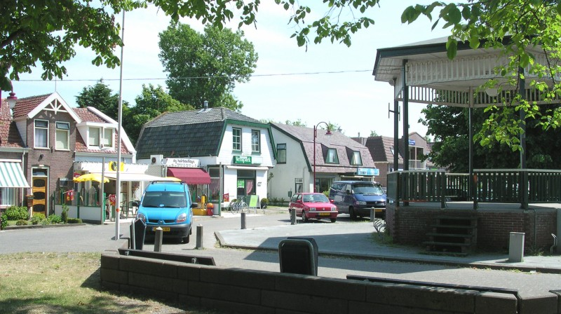 Centrum van het dorp Julianadorp. Center of the village Julianadorp.